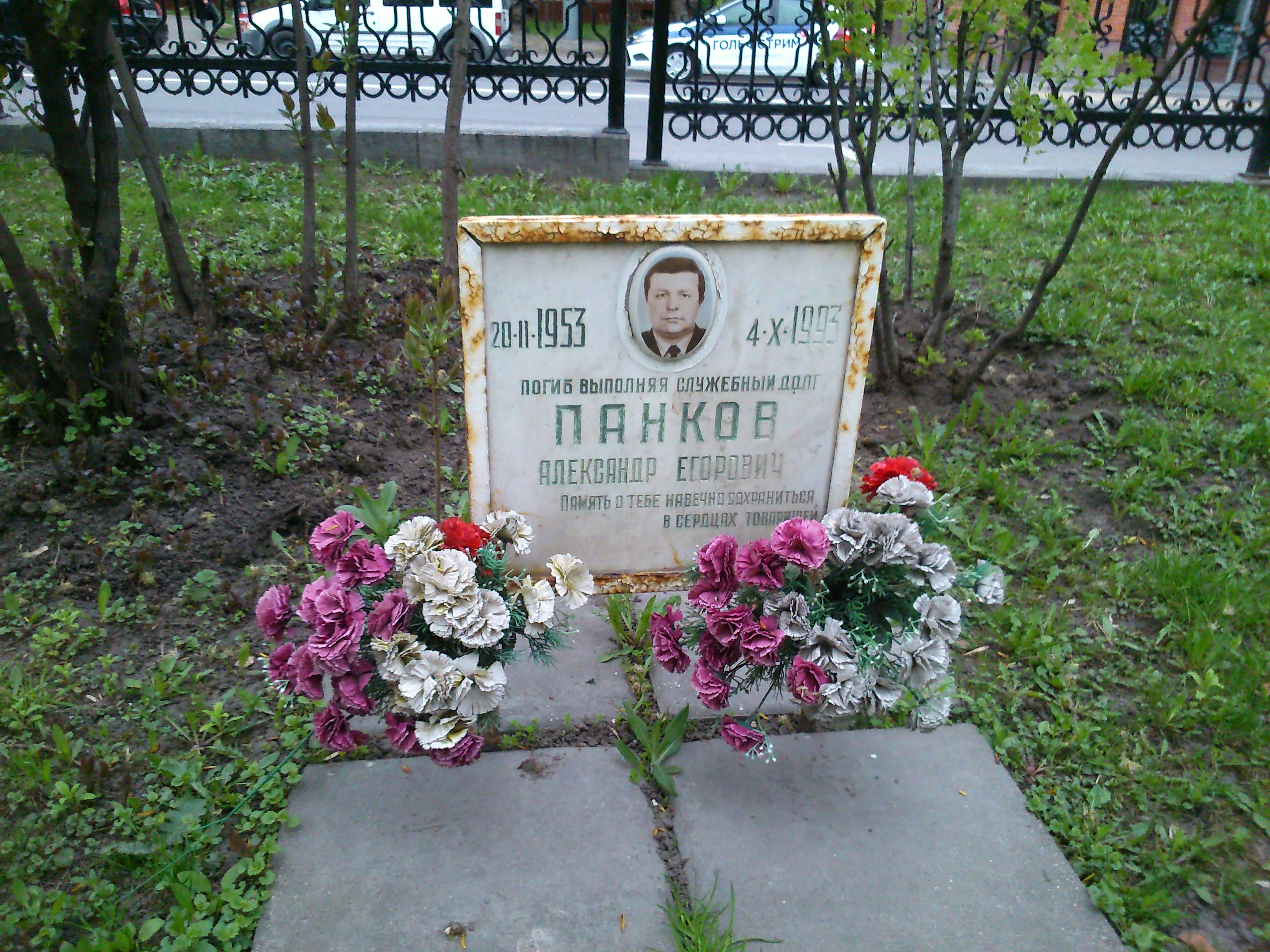 Памятная доска А. Е. Панкову в парке Декабрьского восстания, Москва, Россия